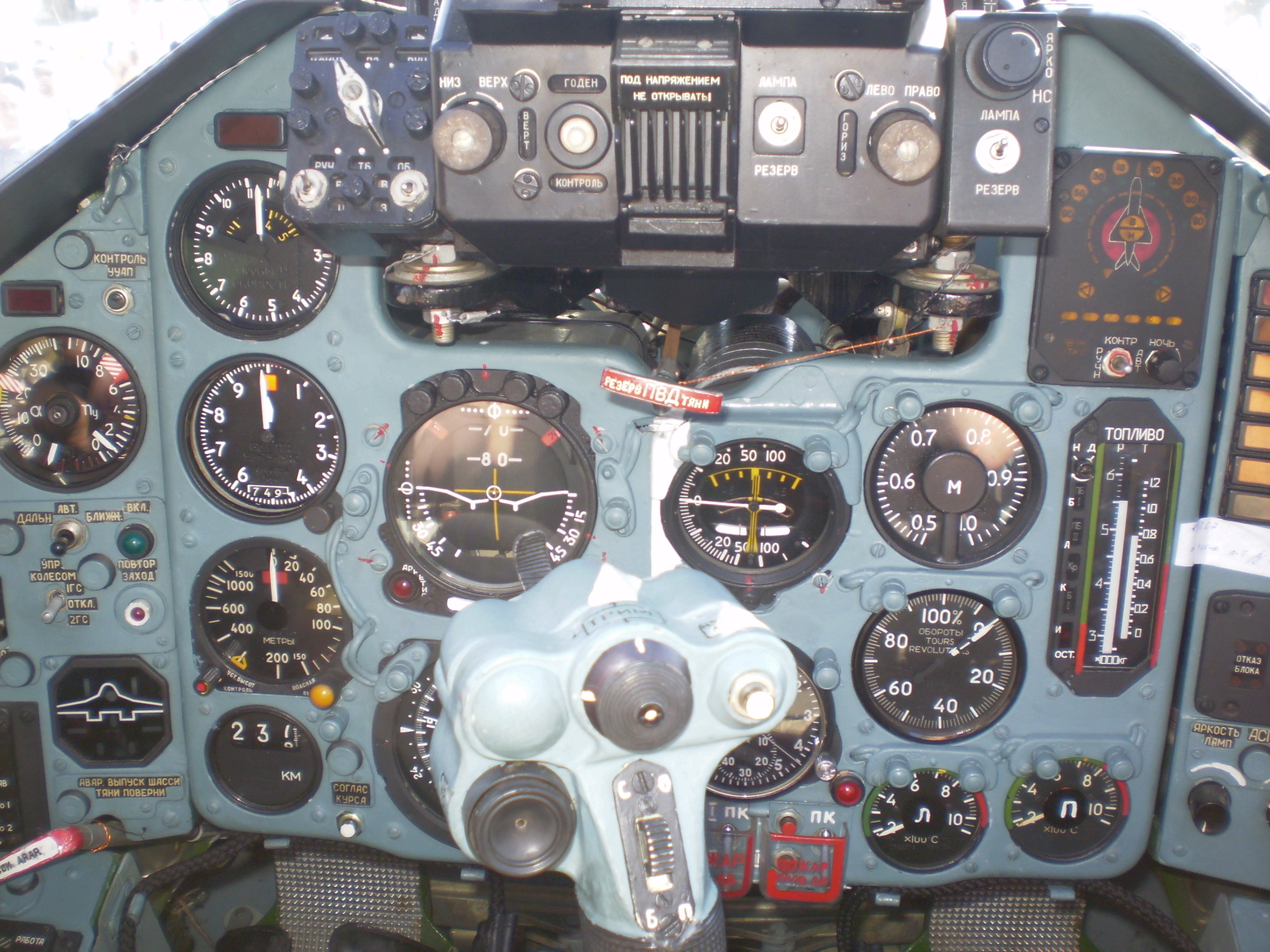 Вид на приборную панель Су-25